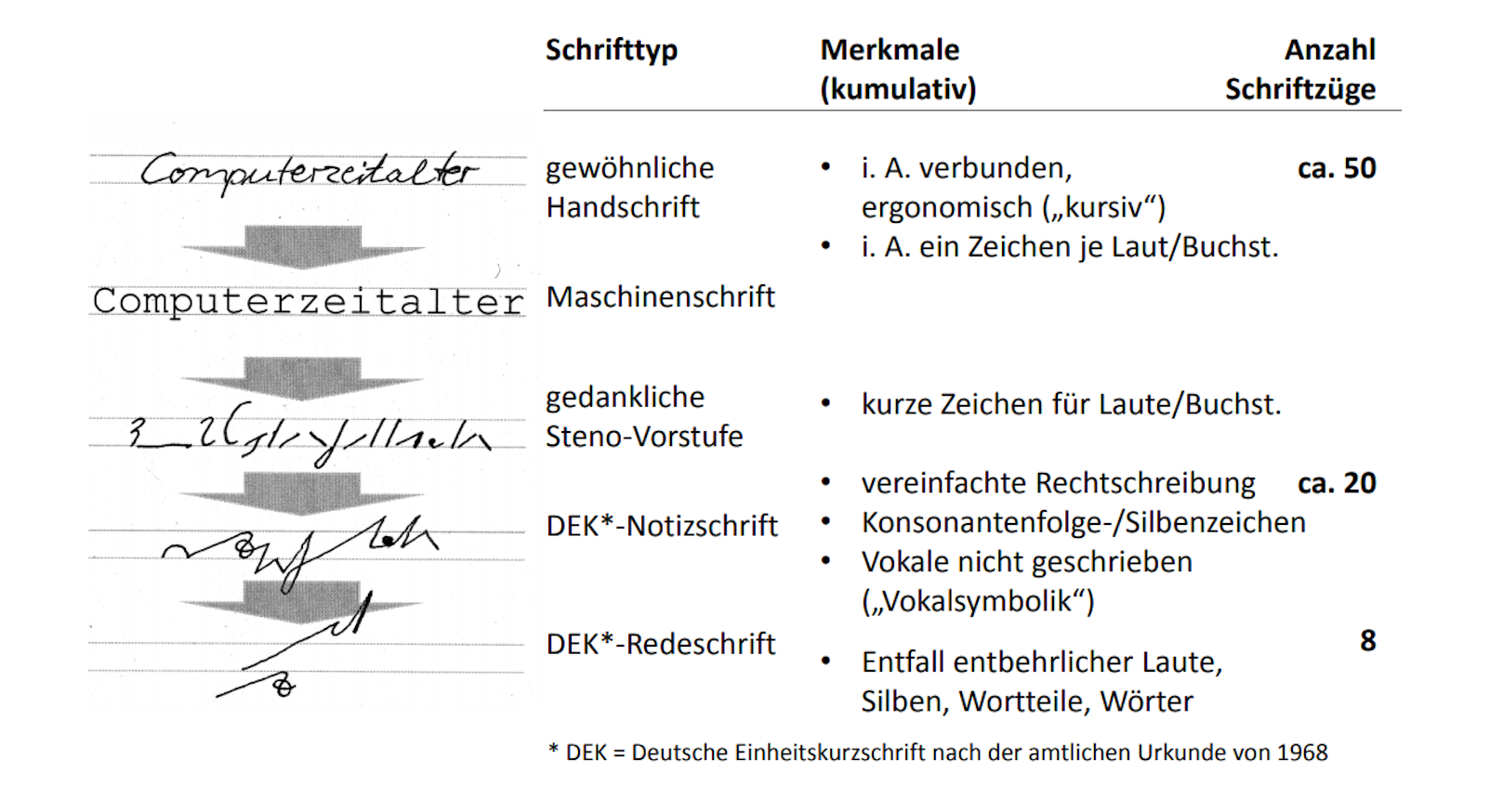 Notizschrift (DEK) im Kontext